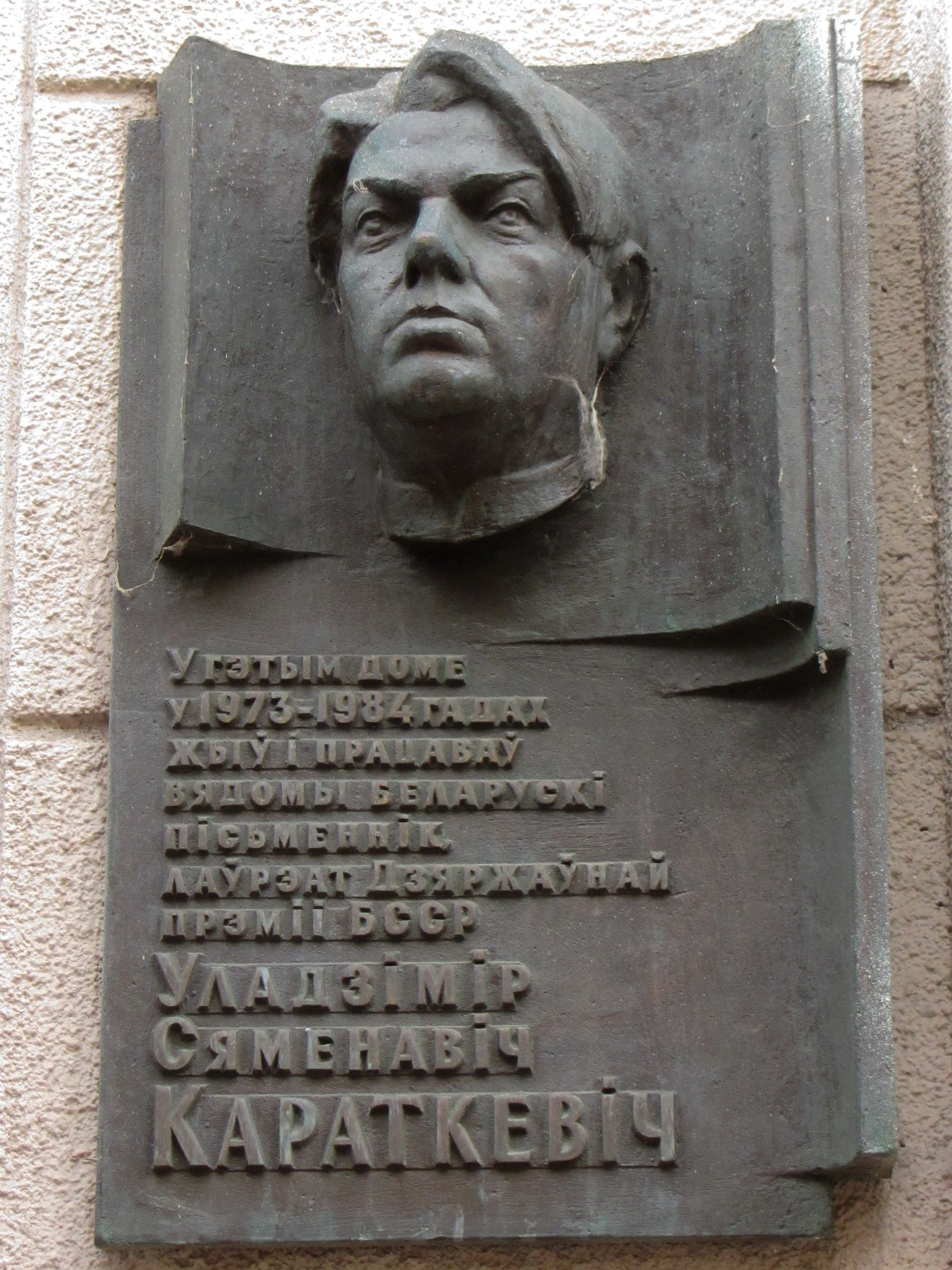 Беларуская (тарашкевіца): Памятная дошка Ўладзімеру Караткевічу ў Менску, вул. Карла Маркса, 36